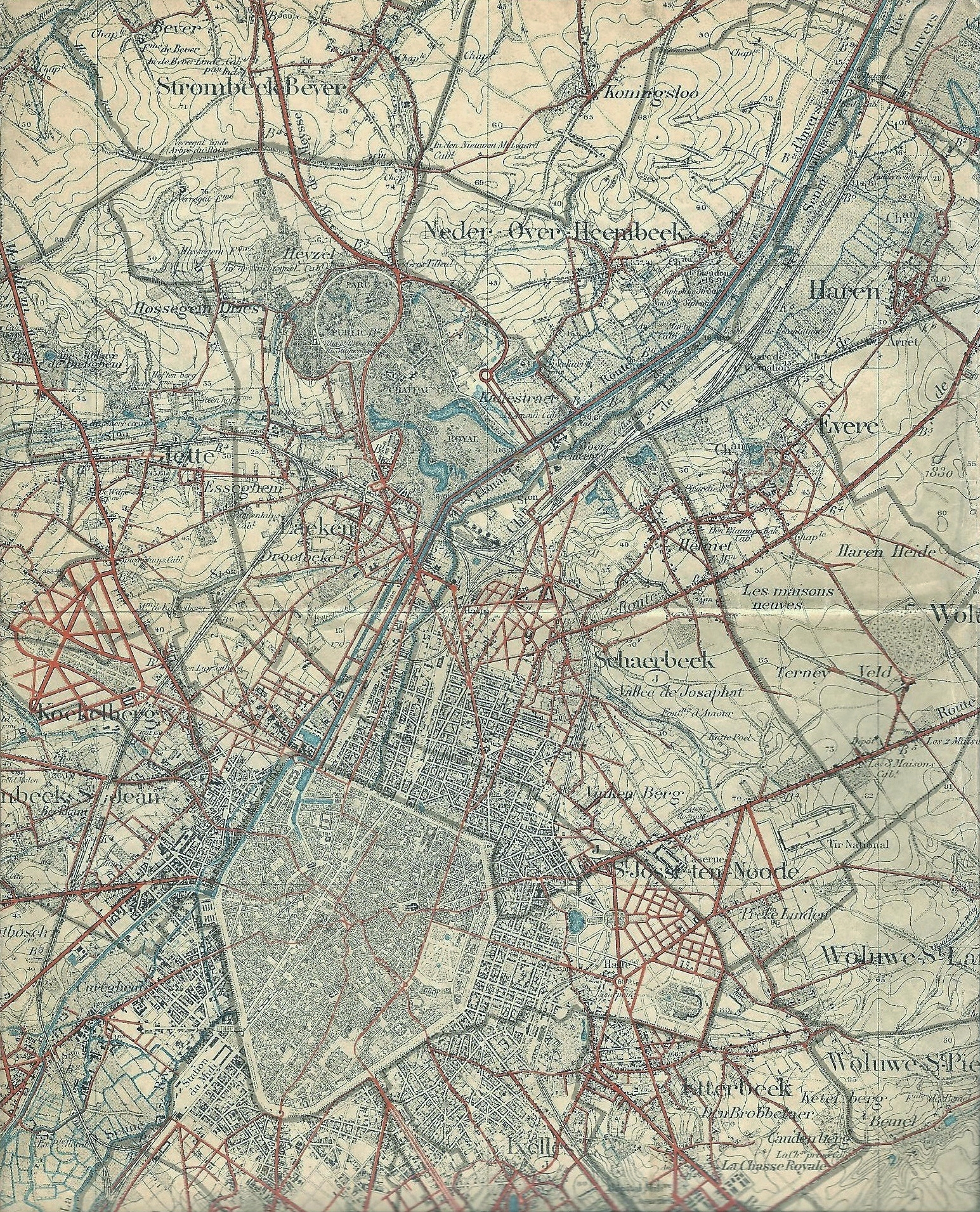 Militaire stafkaart van Brussel en omgeving. De oude buurtspoorwegroute in Laeken is te zien.